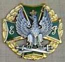 Złota Odznaka Platerówek i 2 Armii WP